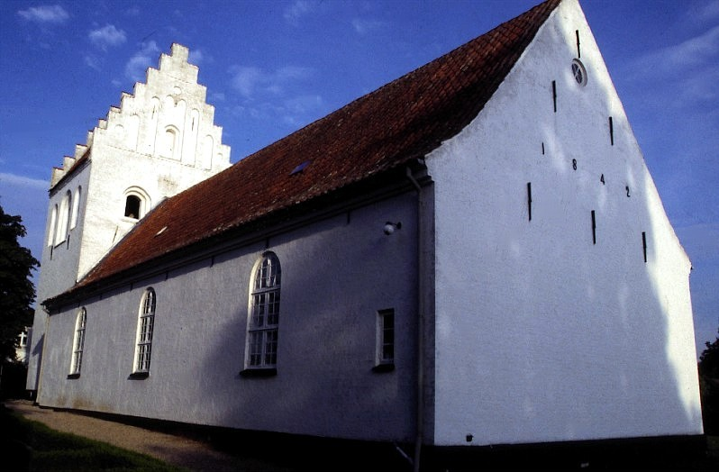 Ejby Kirke (Middelfart Kommune) i Danmark. Ejby kirke